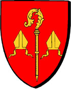 Landreger. Ardamez an eskopti